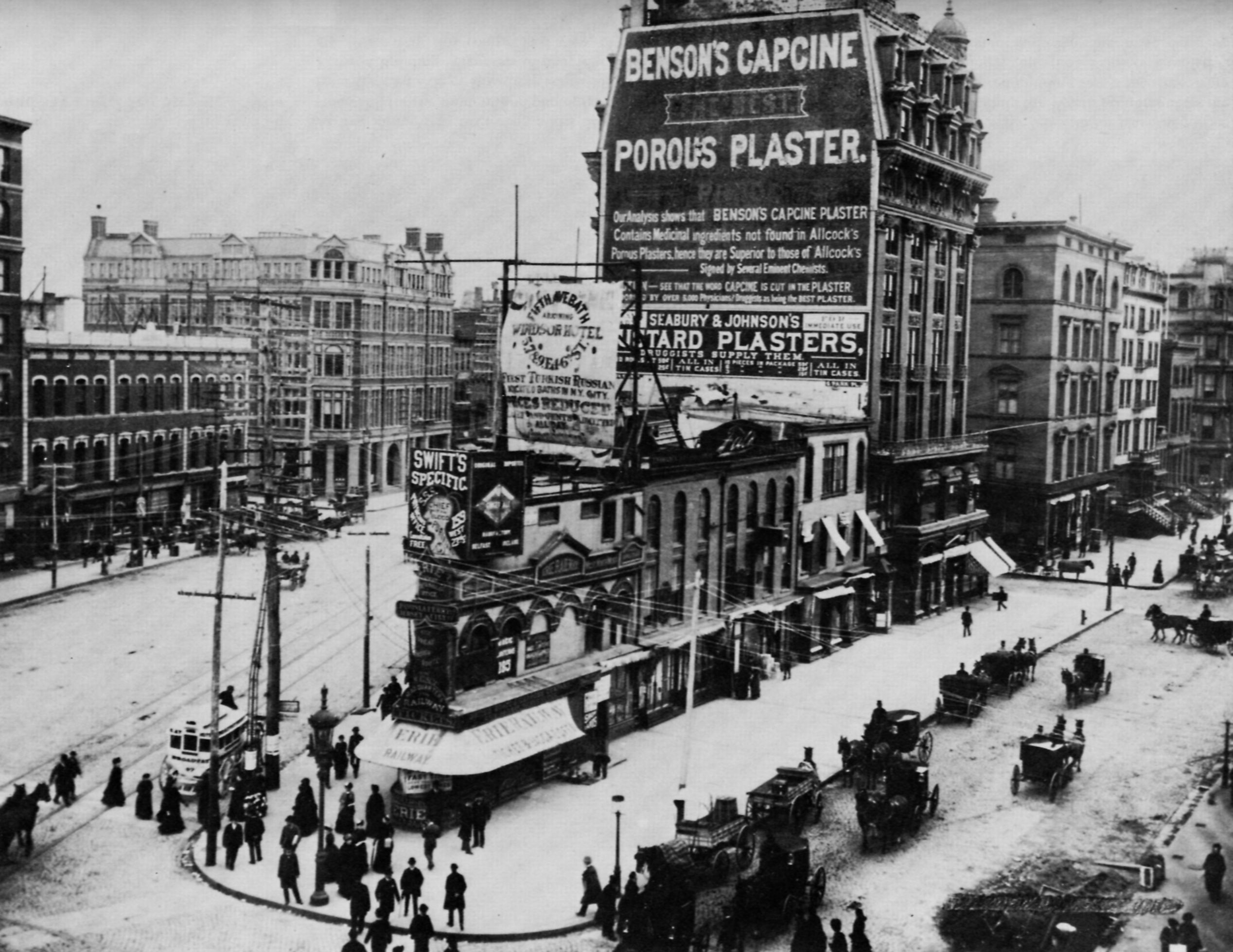 Amerikanischer Photograph um 1884: Fifth Avenue und Broadway an der 23rd Street